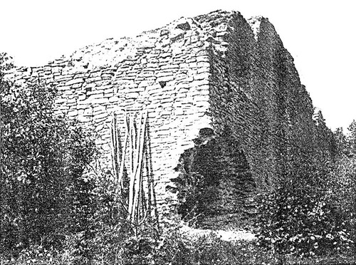 Alteni ordulinnus. Kastelli lõunanurk.